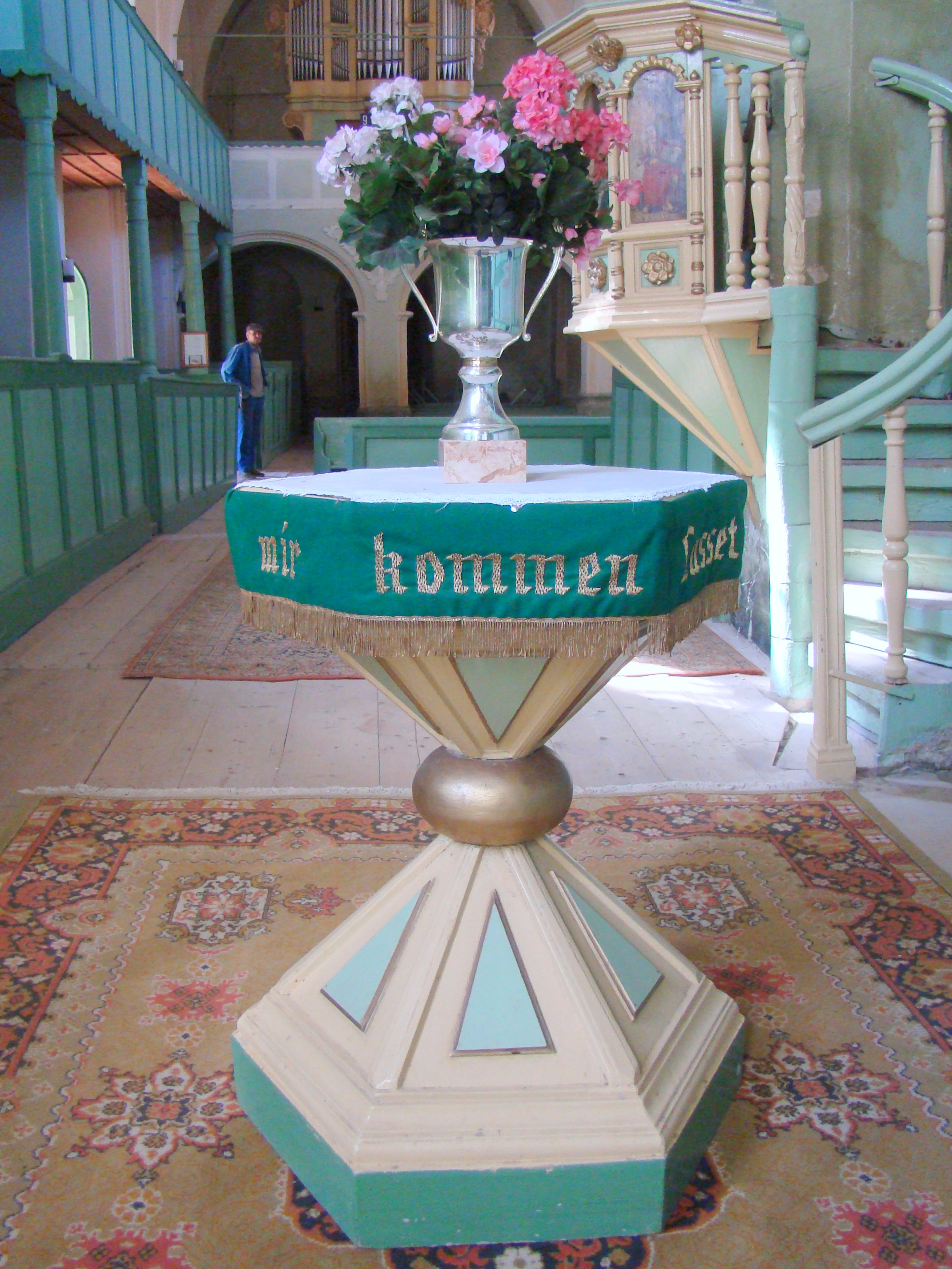 Biserica evanghelică fortificată, sat Șoarș; comuna Șoarș 282 sec. XV - XVI, 1806